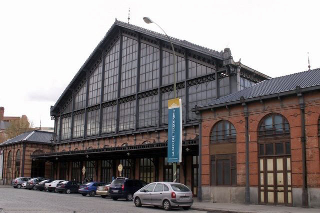 Estación de las Delicias, en Madrid (España). Obra del ingeniero Emile Cachelievre entre 1879 y 1880. Hoy convertida en Museo del Ferrocarril y en el Museo de la Ciencia y la Tecnología.